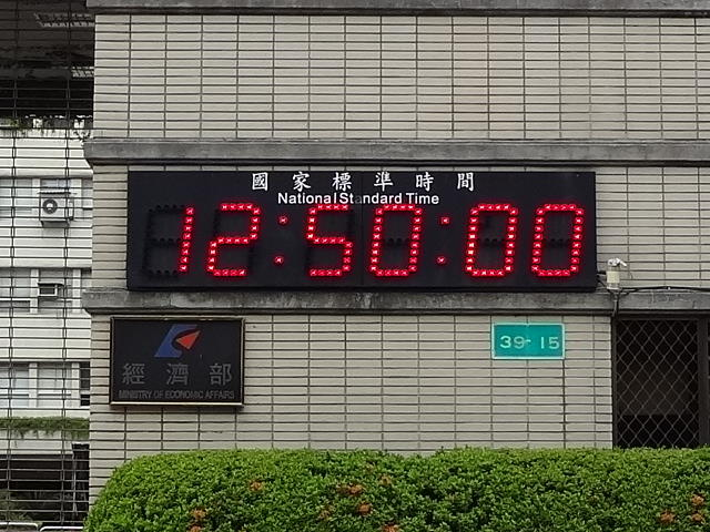 中華民國經濟部大樓大門右側，經濟部銘板上方設置的國家標準時間電子鐘。